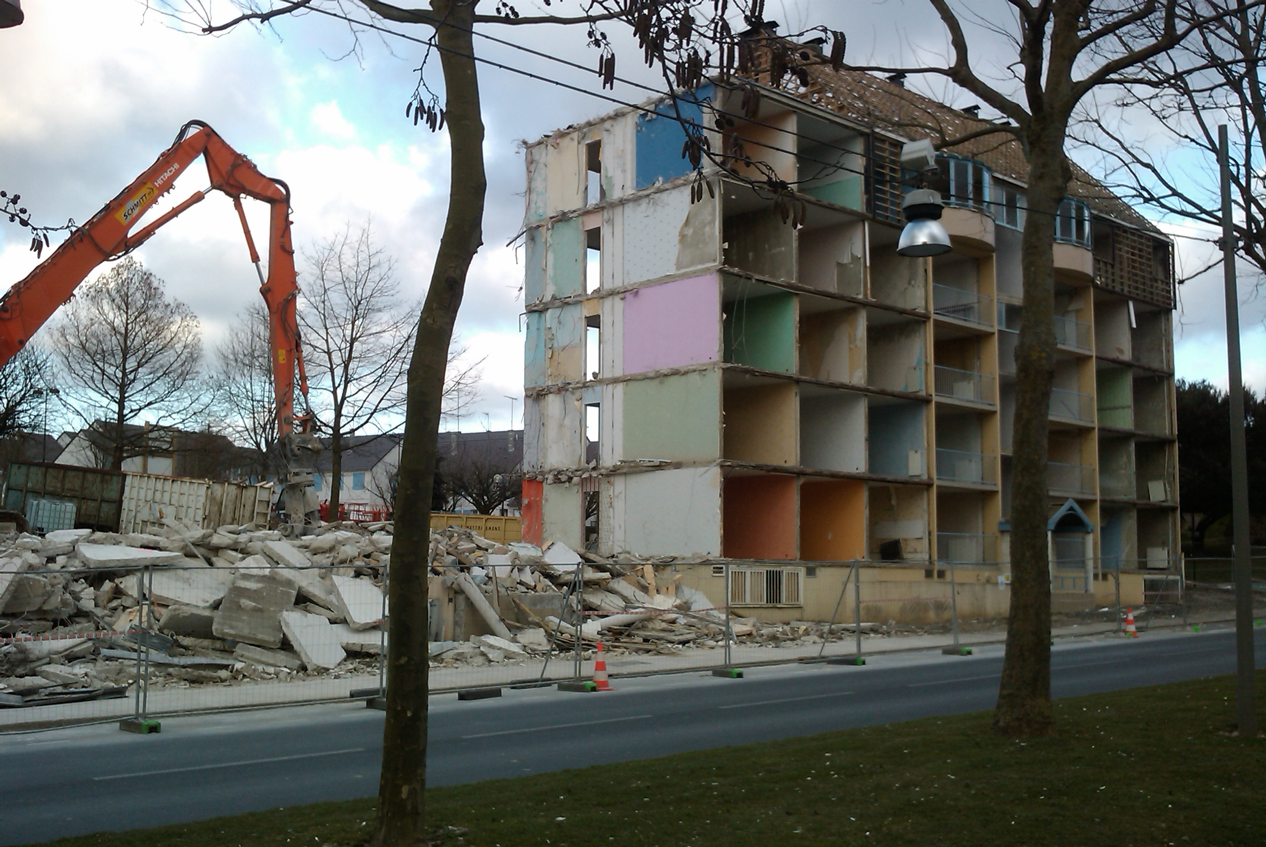 immeuble du Val-Saint-Jean en demolition (avenue des platanes)